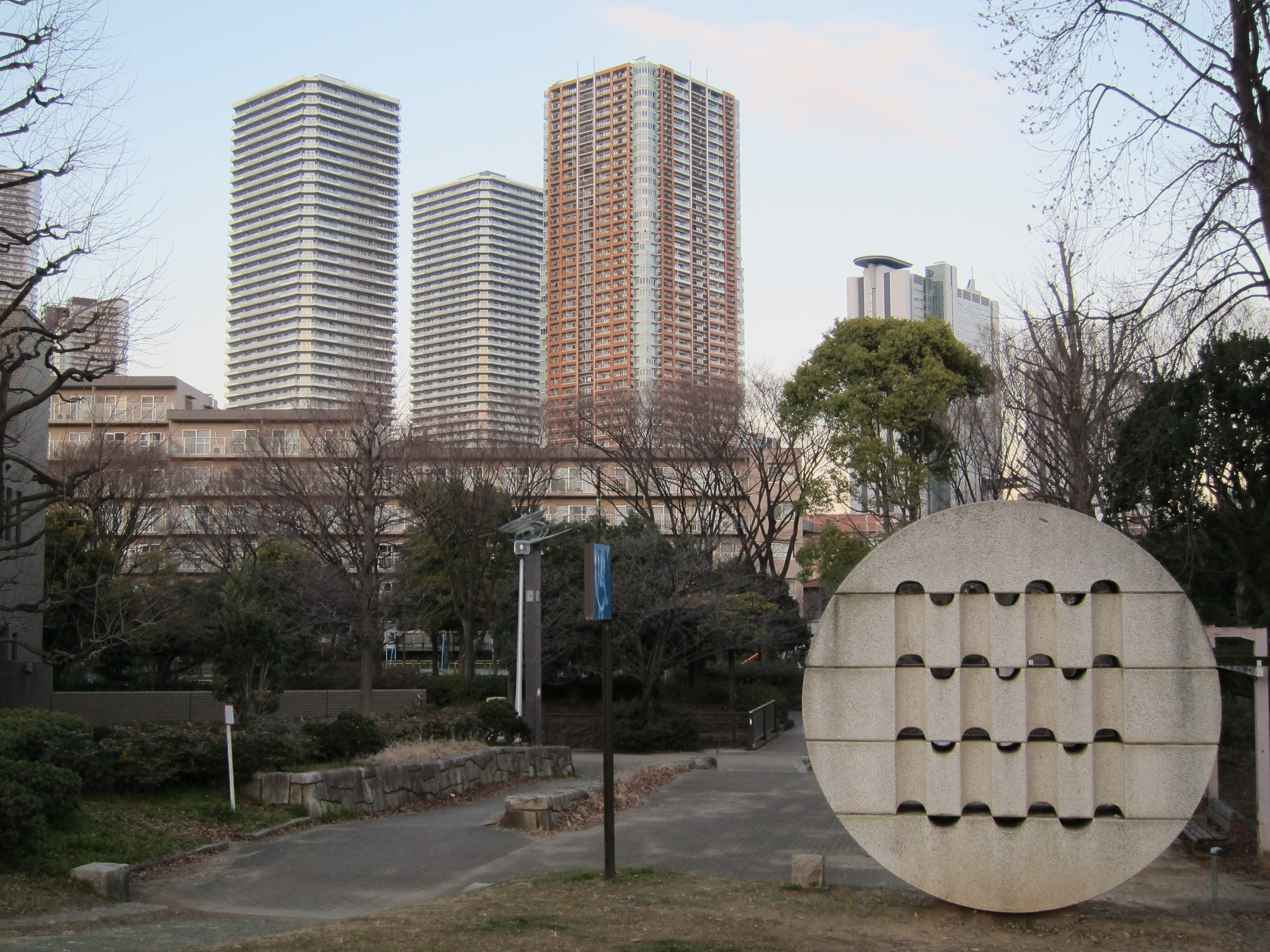 Nakahara-heiwa park , Kawasaki